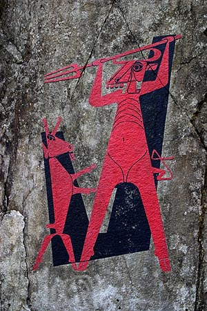 Wandbild "Teufel und Ziege" in der Schöllenen (Teufelsbrücke)